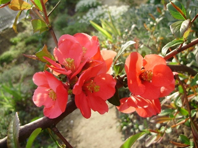 Chaenomeles japonica,Japanska dunja